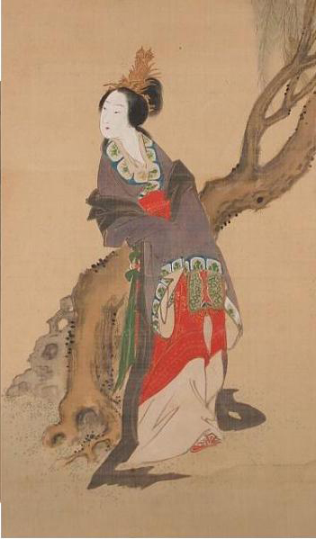 中林竹洞筆『楊貴妃図』（美人画：中国伝説上の人物画）絹本 35x101